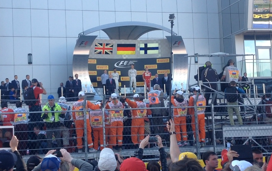 Формула-1 в Сочи, 2016 год - Президент России и пилоты во время исполнения гимна победителя этапа в Сочи